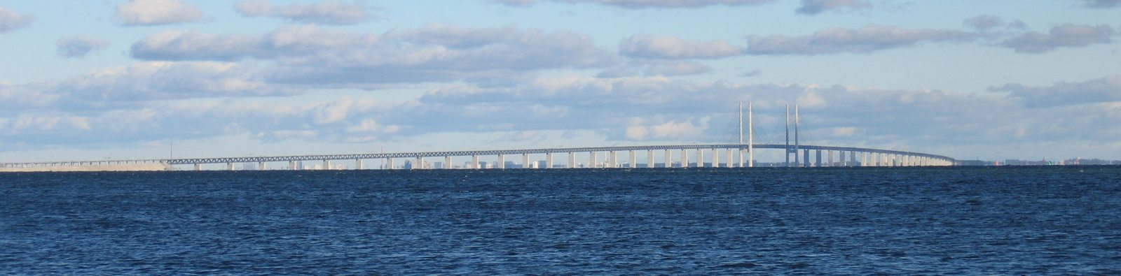 Pont de Øresund vu depuis le sud, au dessus du détroit de l'Øresund entre le Danemark (à gauche) et la Suède (à droite). Ce pont à haubans part à gauche de l'île artificielle danoise de Peberholm et arrive à la ville suédoise de Malmö à droite.